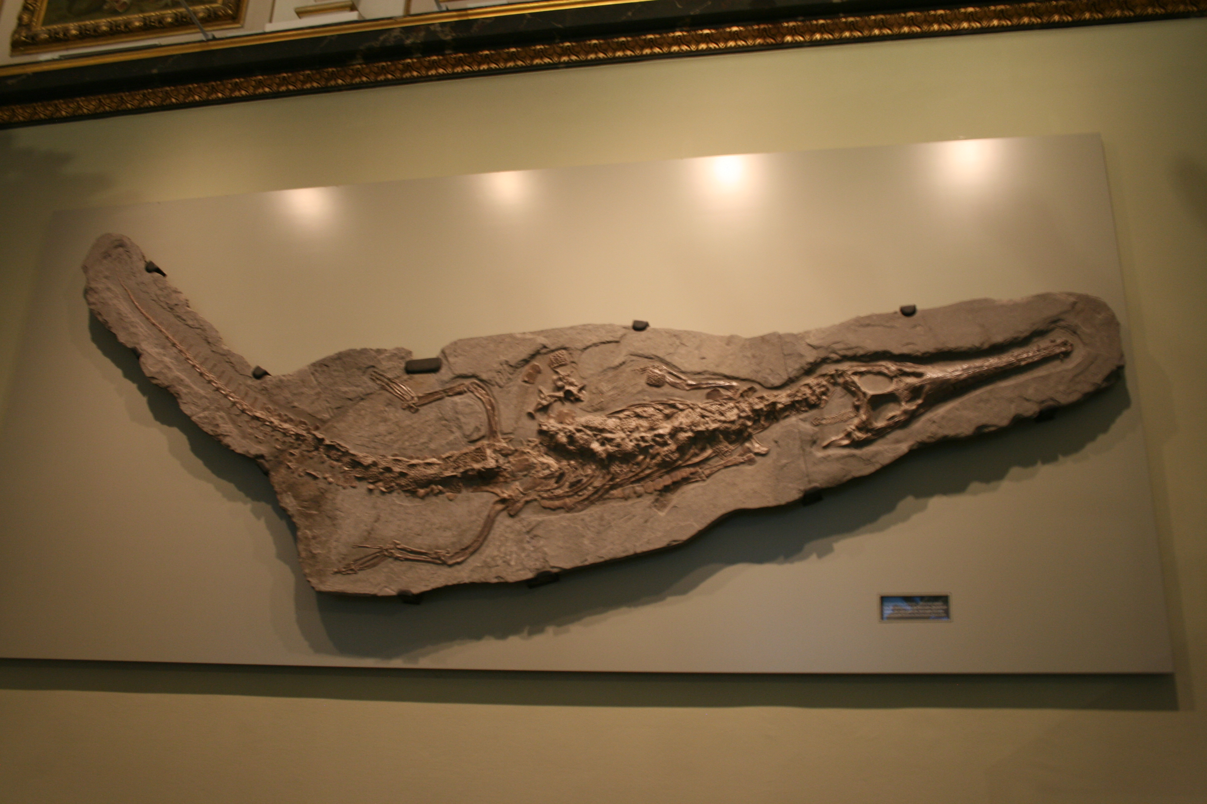 Steneosaurus bollensis